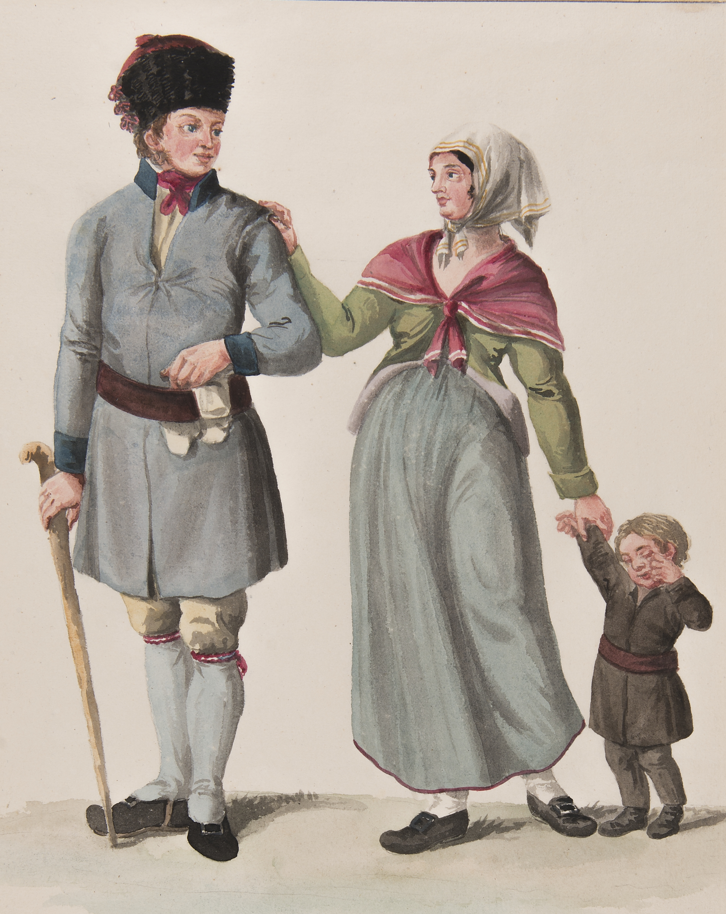 "Habitants de la Province de la Gestrikland", Tre personer en man en kvinna och ett barn i dräkt. Akvarell av C.W Swedman. Depicted place: Sweden (Q34) (Land), Gästrikland (Q183459) (Landskap)